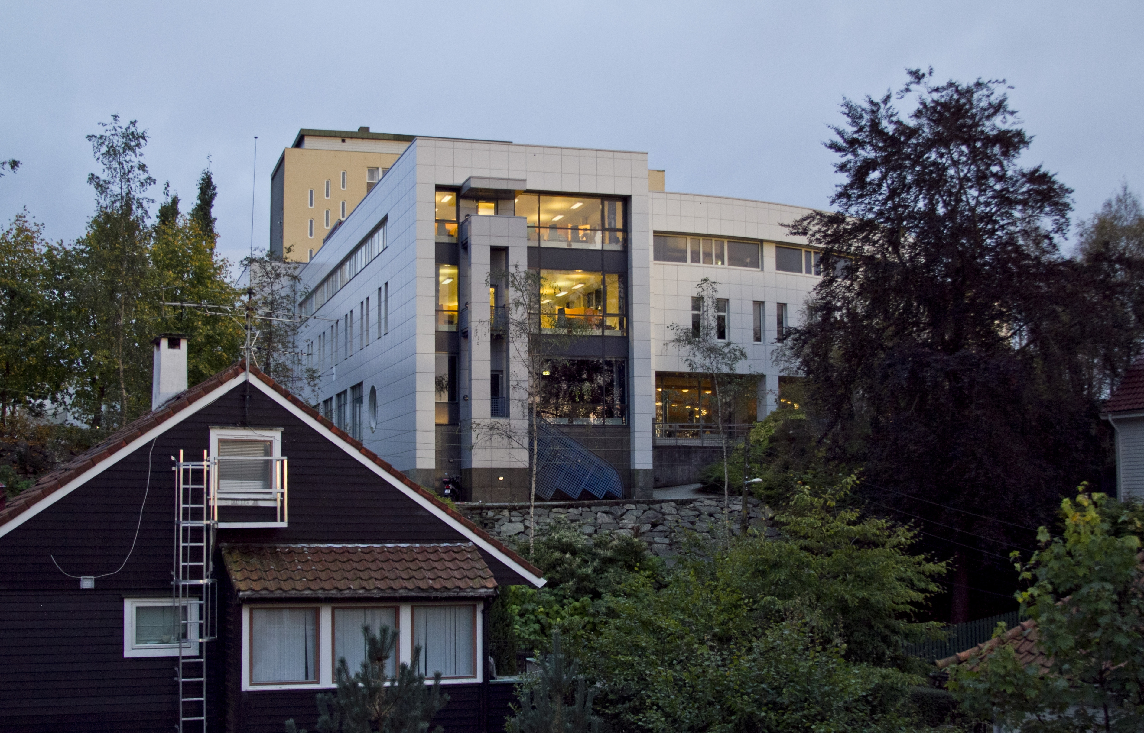 NHH, Sandviken, Bergen, Hordaland, Norway